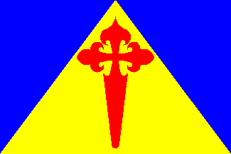 Decreto polo que se aproba a bandeira do Concello de Paradela. Diario Oficial de Galicia nº 241 de 11/12/1986